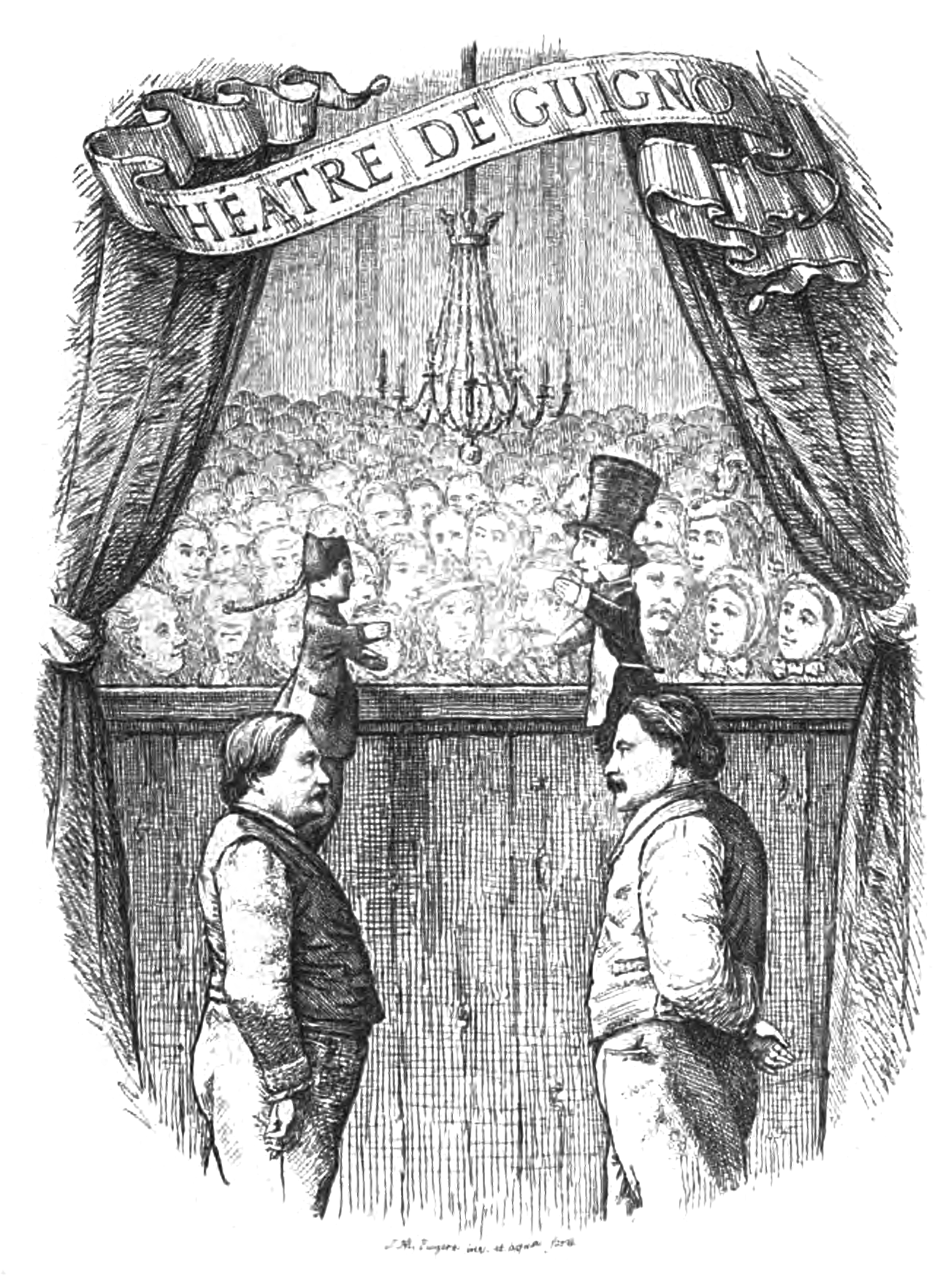 Théâtre de Guignol.